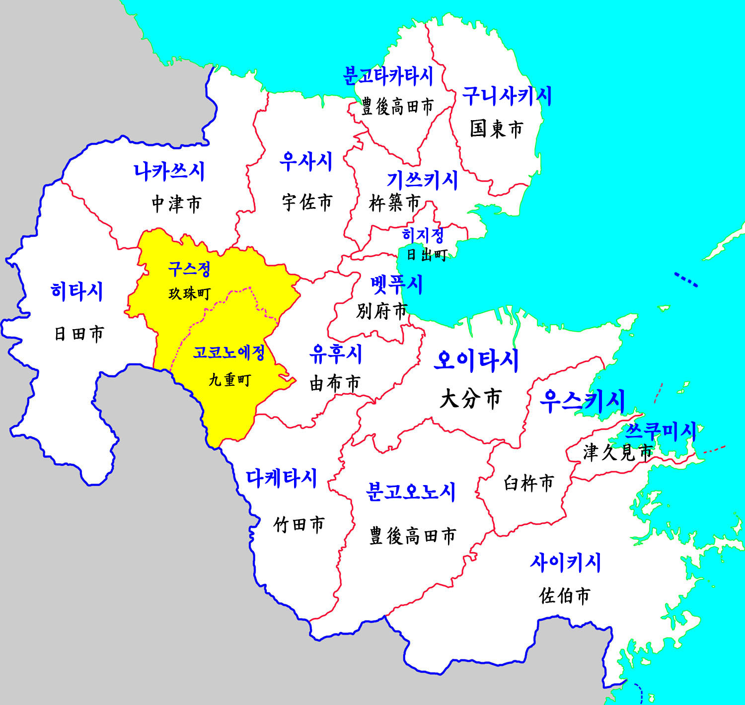 오이타현 행정구역